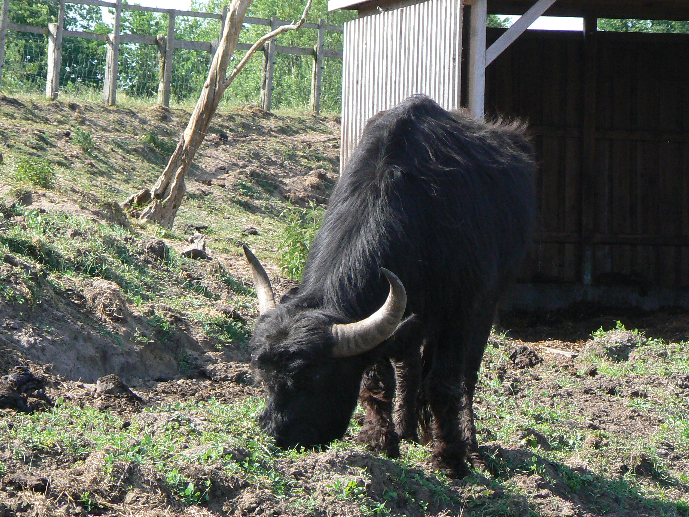 Der Europäische Hauswasserbüffel ist gedrungen, die Beine sind recht kurz. Er ist schiefergrau bis schwarz. Im Gegensatz zu anderen Rindern, deren Hörner einen runden bis ovalen Querschnitt haben, ist der Querschnitt bei den Wasserbüffeln dreieckig. Büffelmilch hat mit 7-8 % doppelt so viel Fett wie Kuhmilch, sie wird hauptsächlich zu Käse verarbeitet (Mozzarella in Italien). Büffelfleisch hat verglichen mit Rinderfleisch 40 % weniger